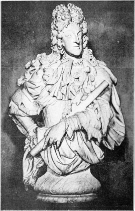 Le buste en marbre à demi corps de Maximilien-Emmanuel de Bavière